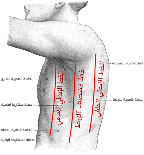 تشريح سطحي لـ خطوط إبطية.